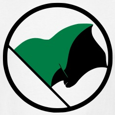 vlajka anarchokapitalizmu